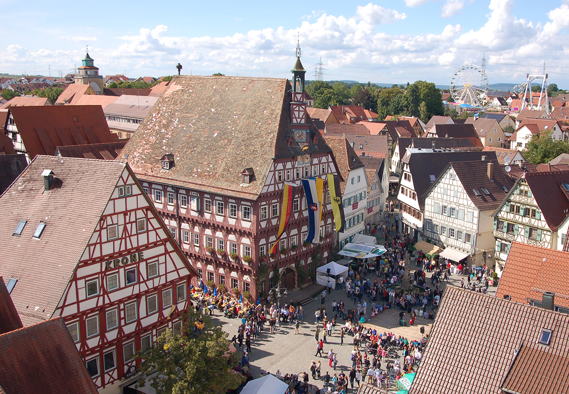 Schäferlauf Markgröningen 2014: Blick vom Hochwachtturm der Bartholomäuskirche auf den Marktplatz